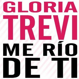 Imagen Promocional de Me Rio de Ti